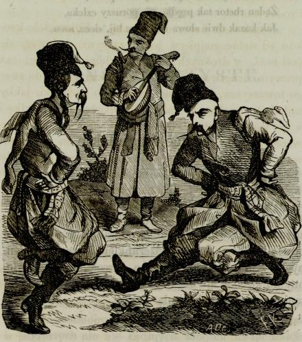 Бойовий танець - Гопак